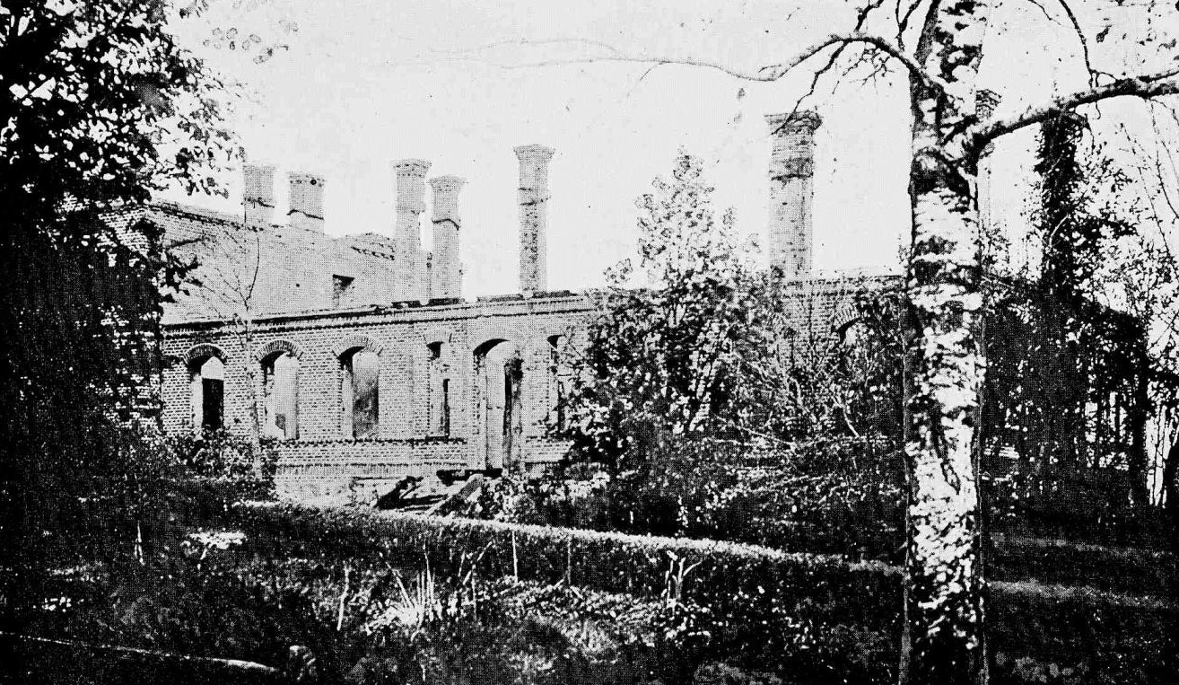 Devēne mõisa peahoone pärast 1905. aasta põlengut.